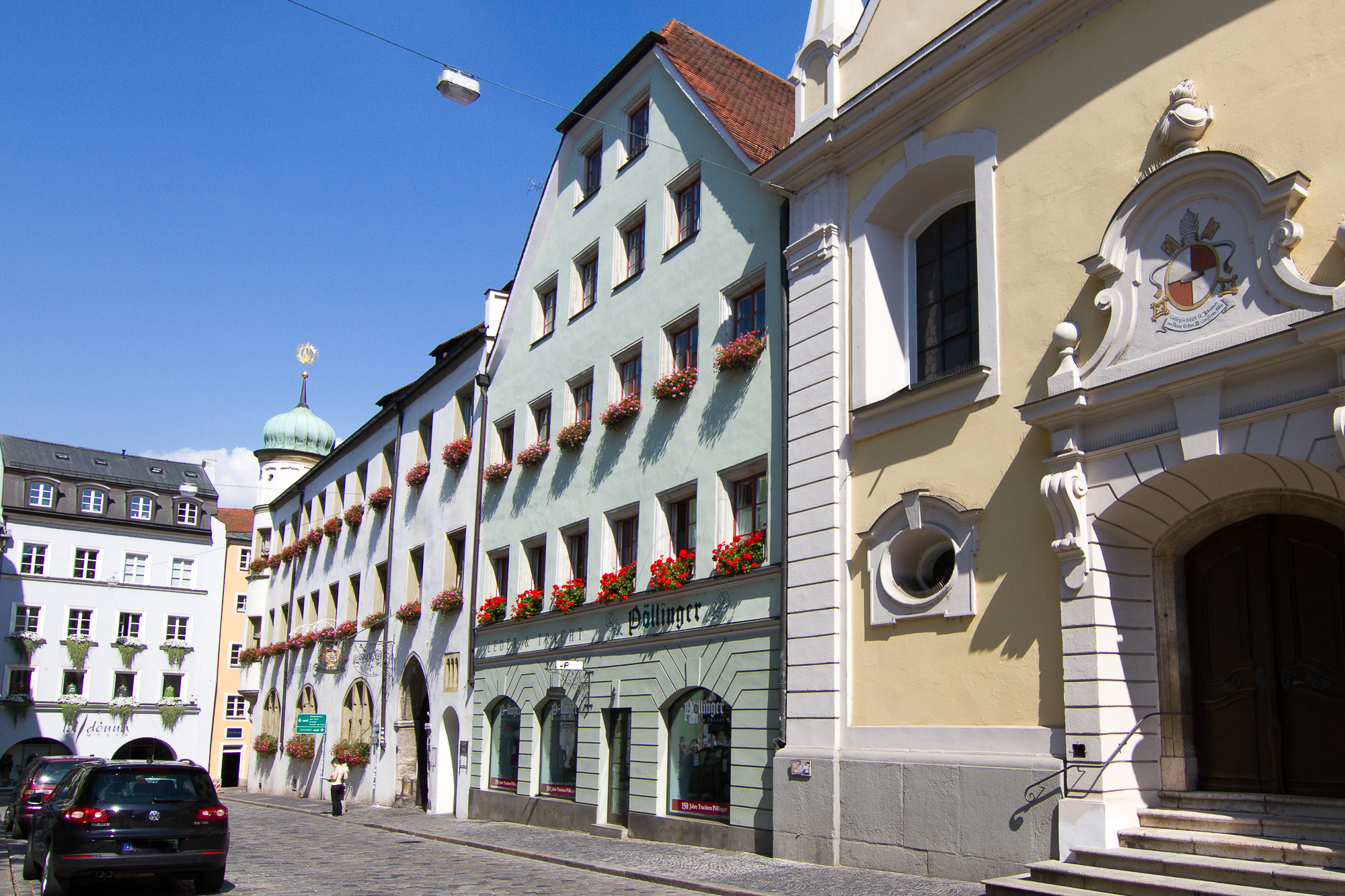 Ehem. bischöfl. Burgrichter- und Rentmeisterhaus; dreigeschossiger und giebelständiger Schopfwalmdachbau, frühes 16. Jh., über romanischem Keller, mit Anbauten des 16. und 19. Jh.This is a photograph of an architectural monument.